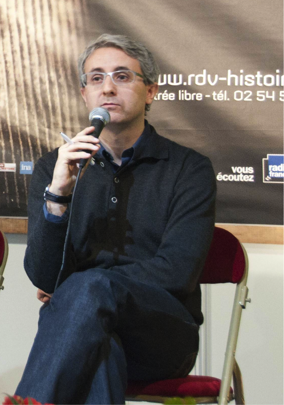 Jablonka Ivan Rendez-vous Histoire Blois